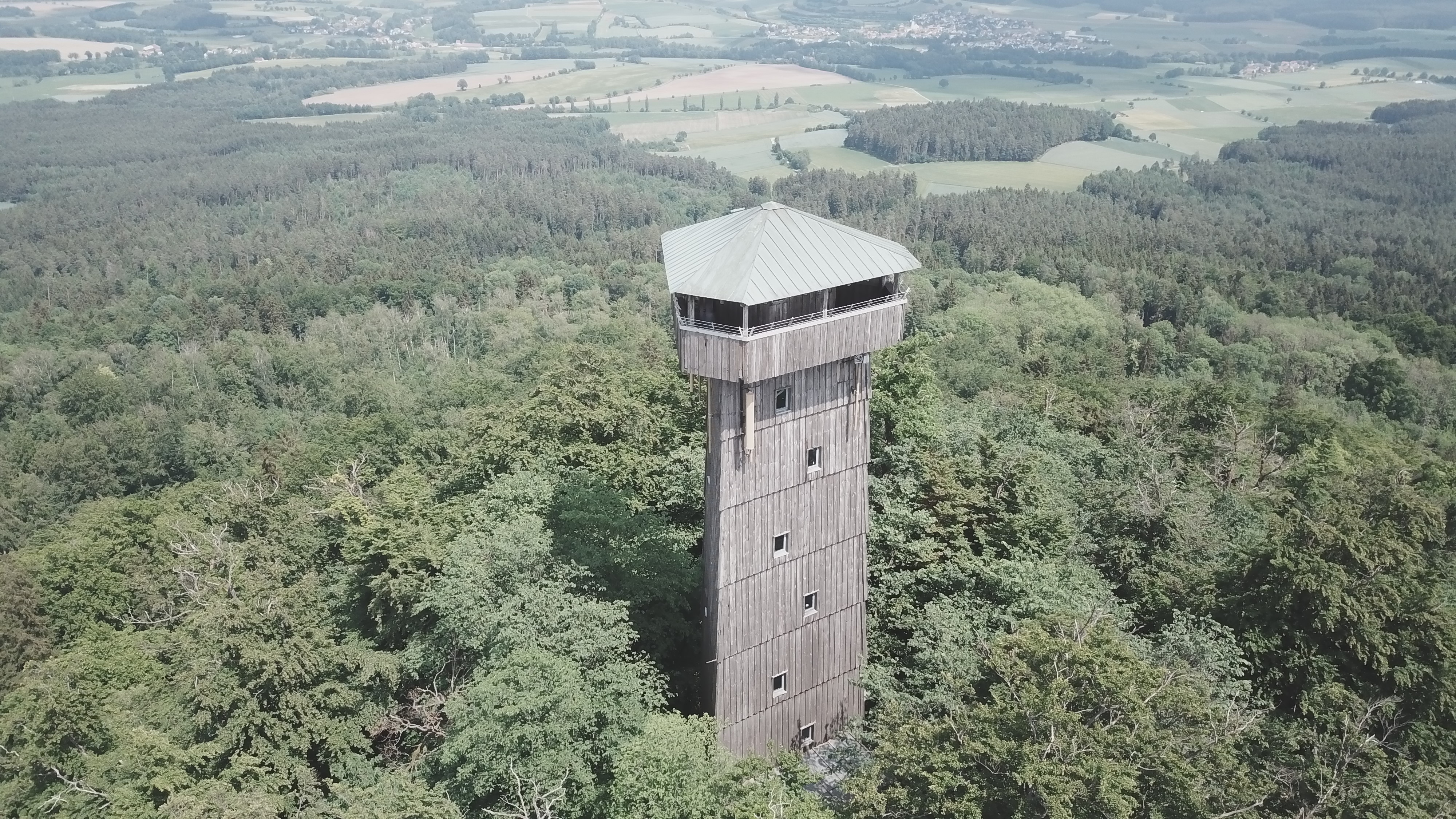 Dies ist eine Luftaufnahme des Aussichtsturms auf dem Rauhen Kulm. Es wurde am 31. Mai 2018 aufgenommen.